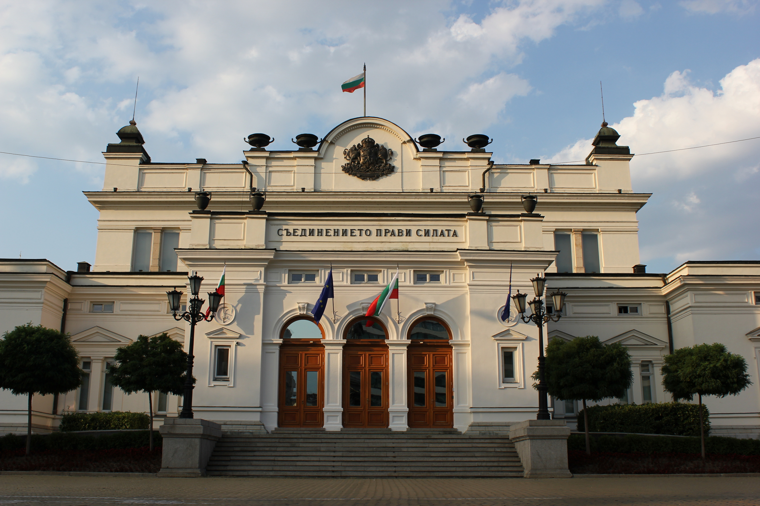 Hornjoserbsce: Bołharski sejm w Sofiji.